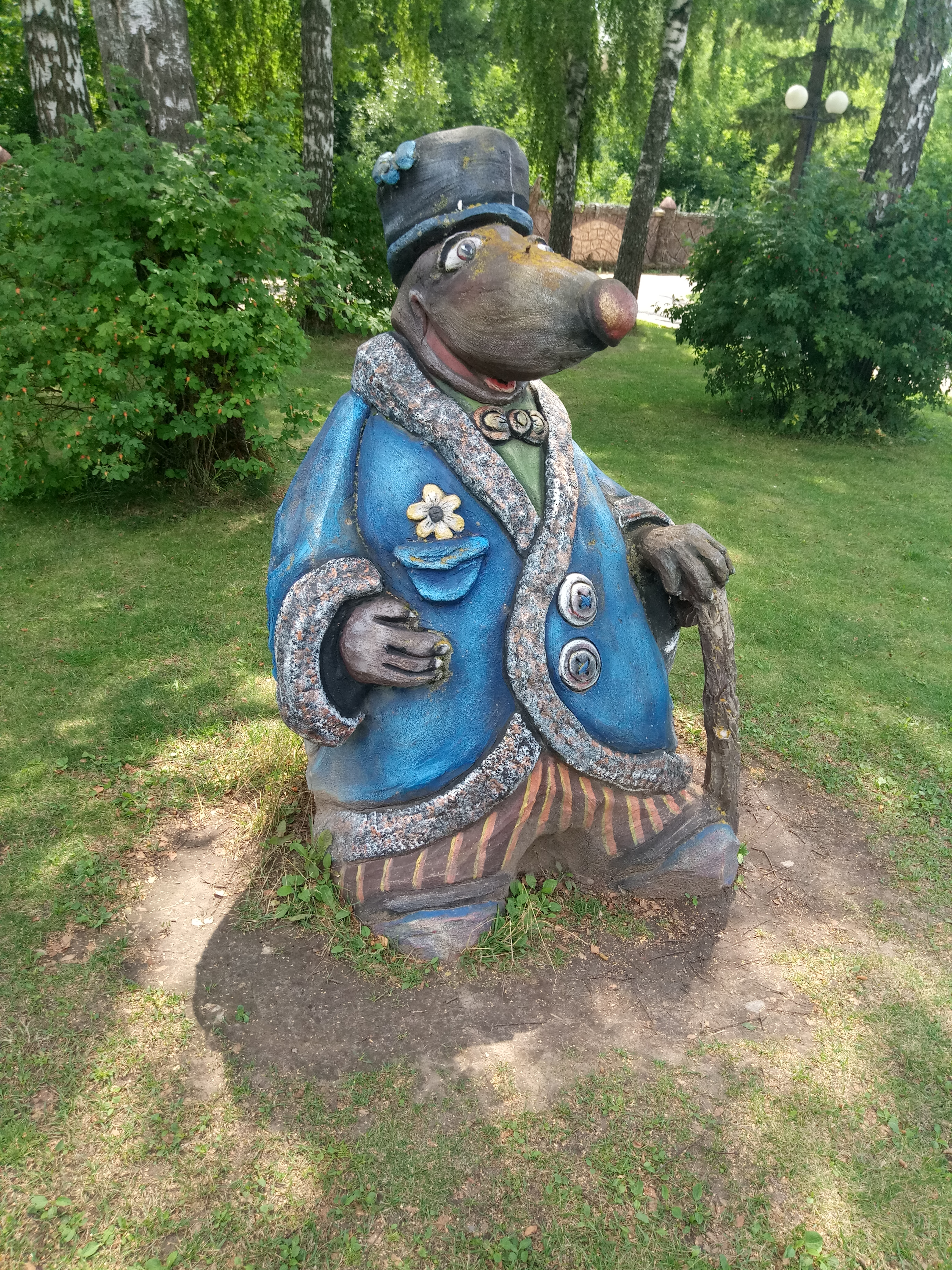 Мышиный король в Козельске